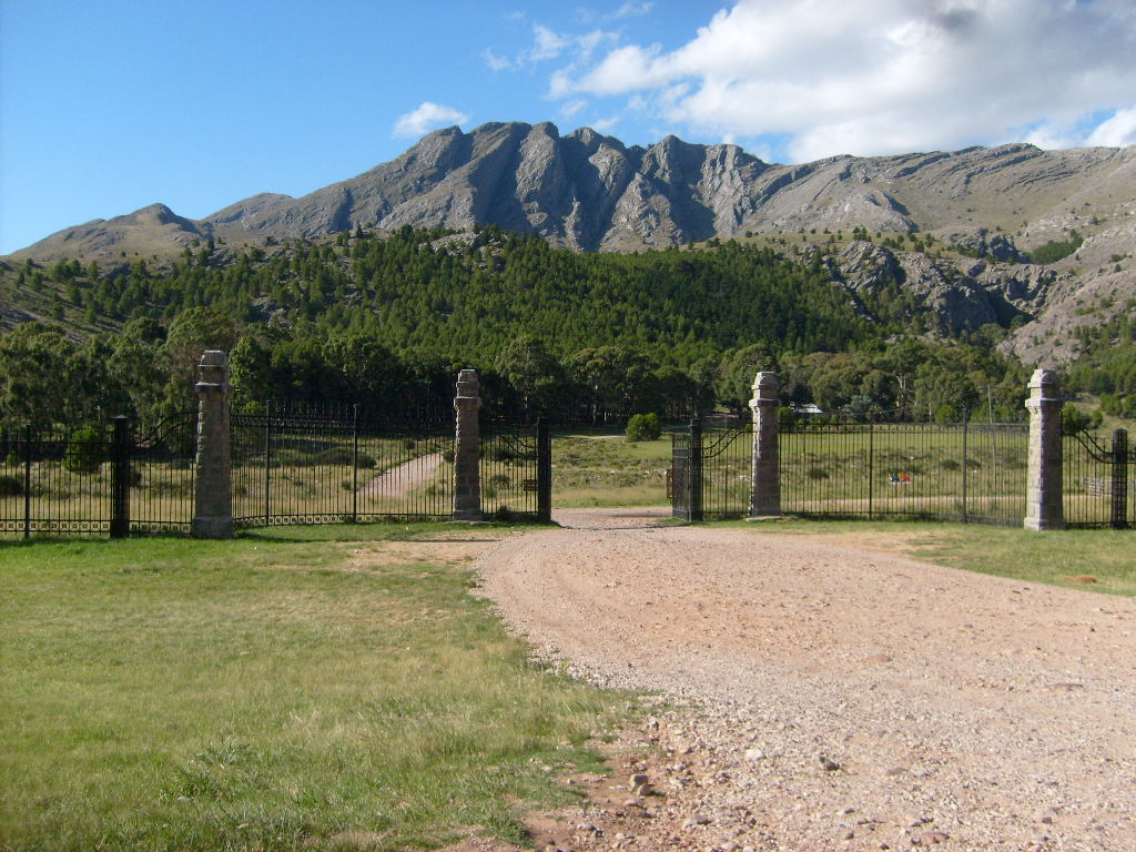 Entrada al Parque Provincial Ernesto Tornquist.